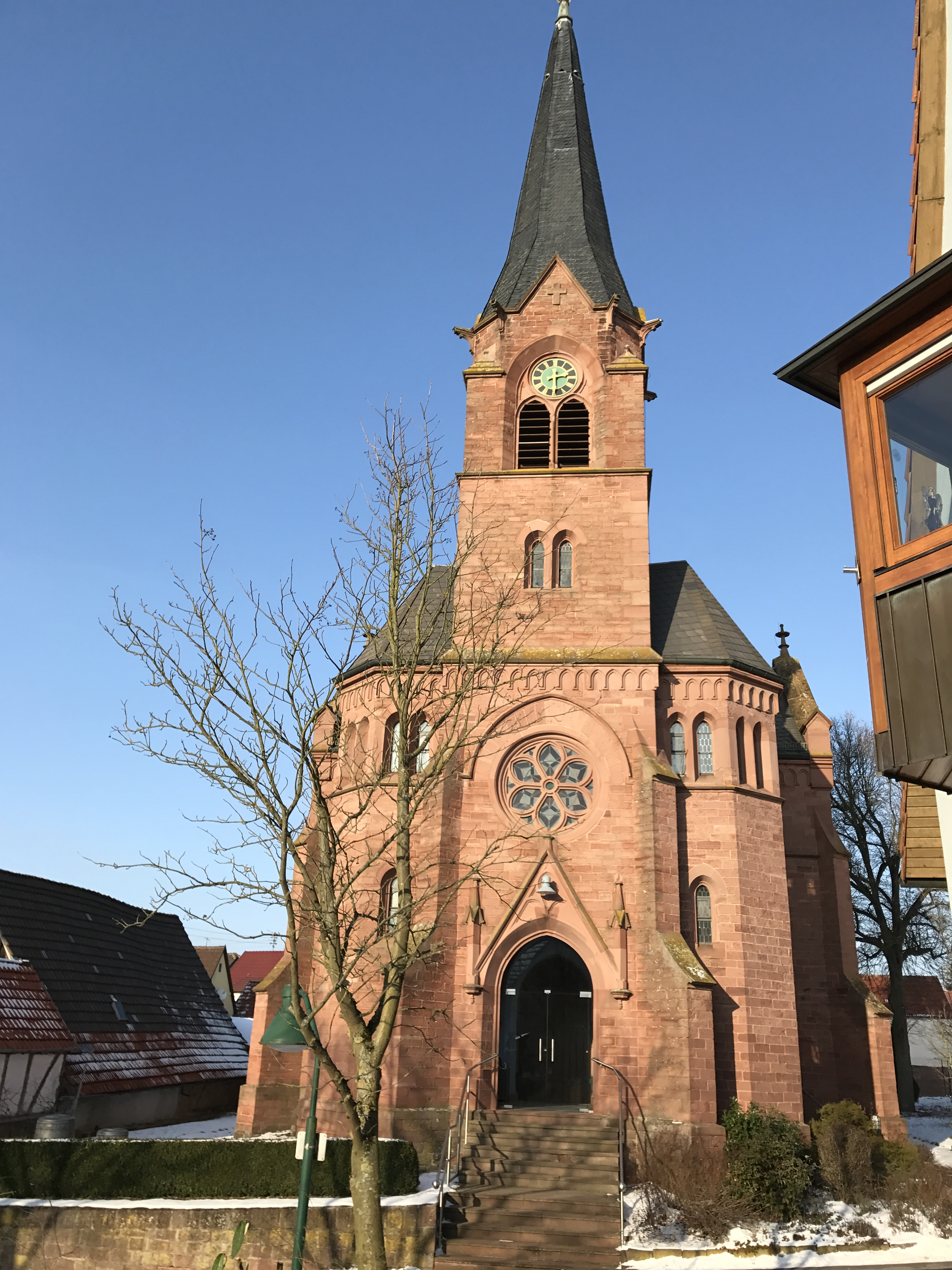 Die evangelische Kirche in Höhefeld bei Wertheim im Main-Tauber-Kreis.